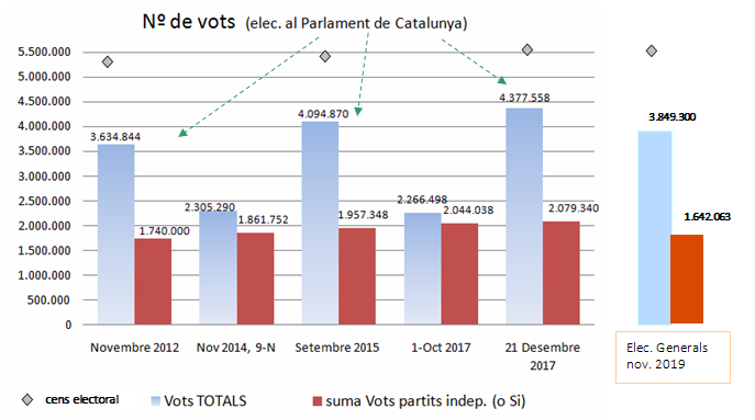 Numero de vots